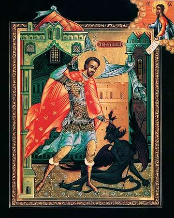 San Niquita